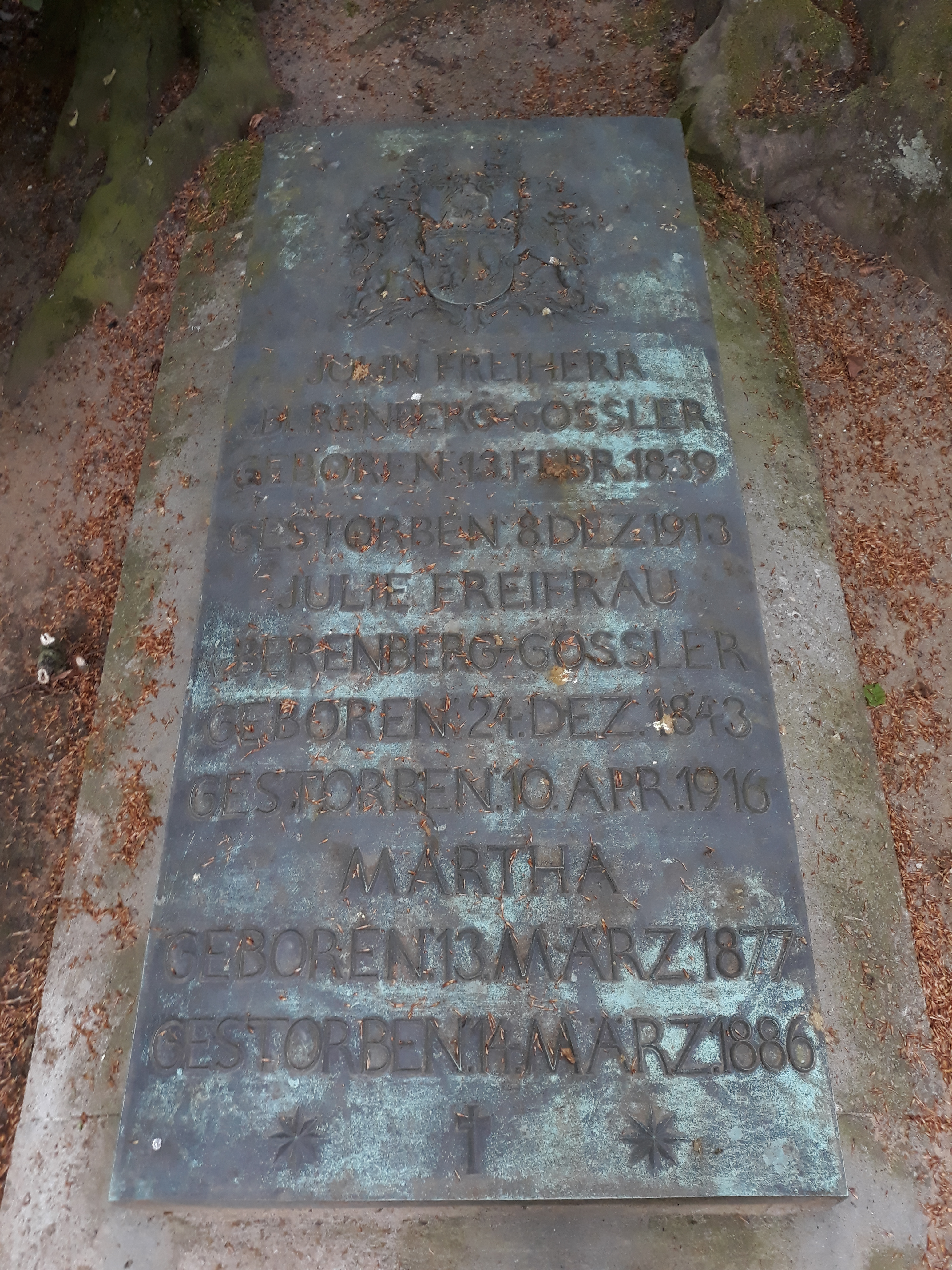 Das Grab des deutschen Bankiers Johann (John) Freiherr von Berenberg-Goßler und seiner Ehefrau Julie (Julaine Amalie) und Tochter Martha in der Familiengrabstätte auf dem Alten Niendorfer Friedhof Hamburg.